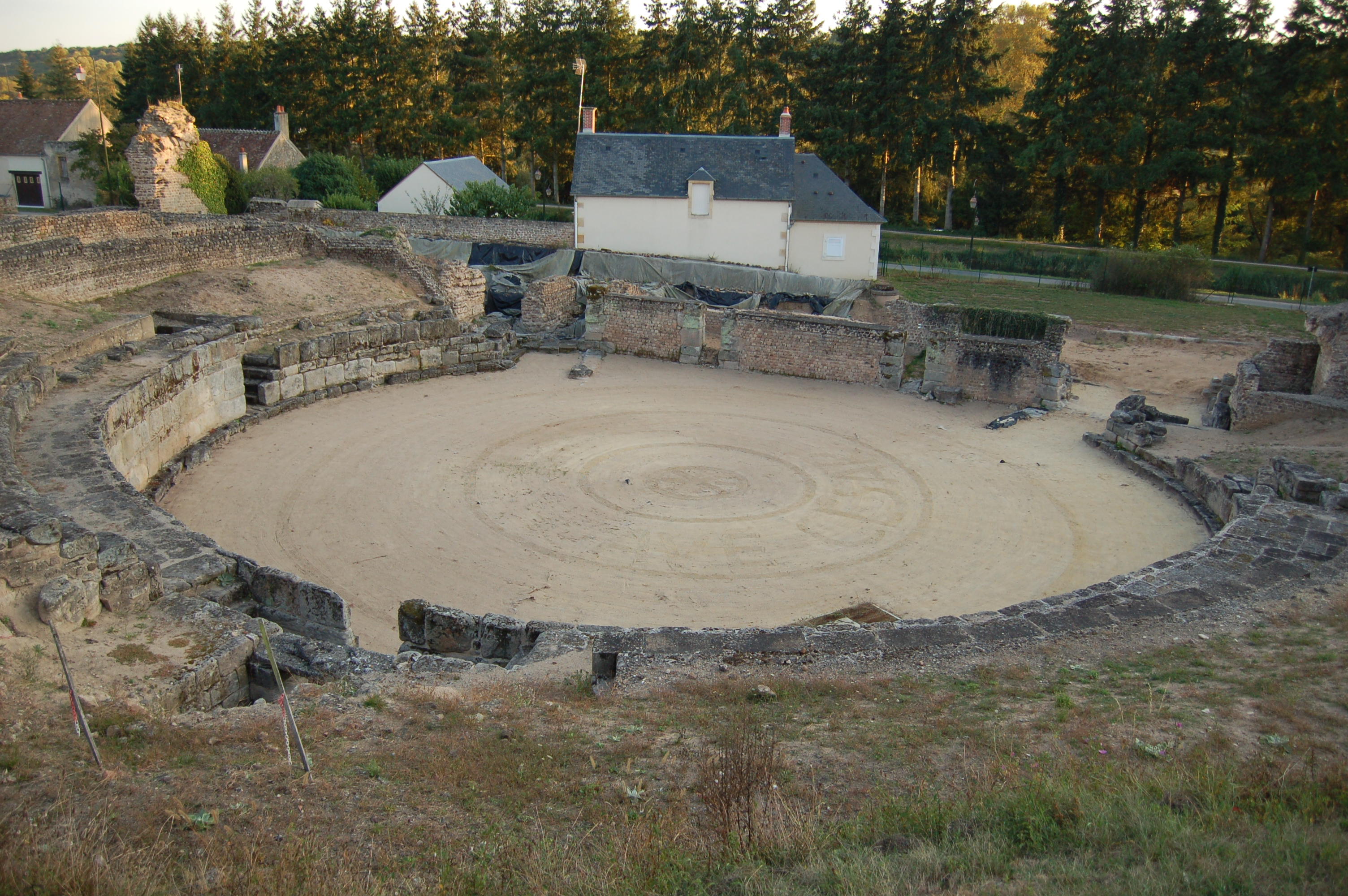 L'amphithéâtre gallo-romain de Drevant, Cher, France.